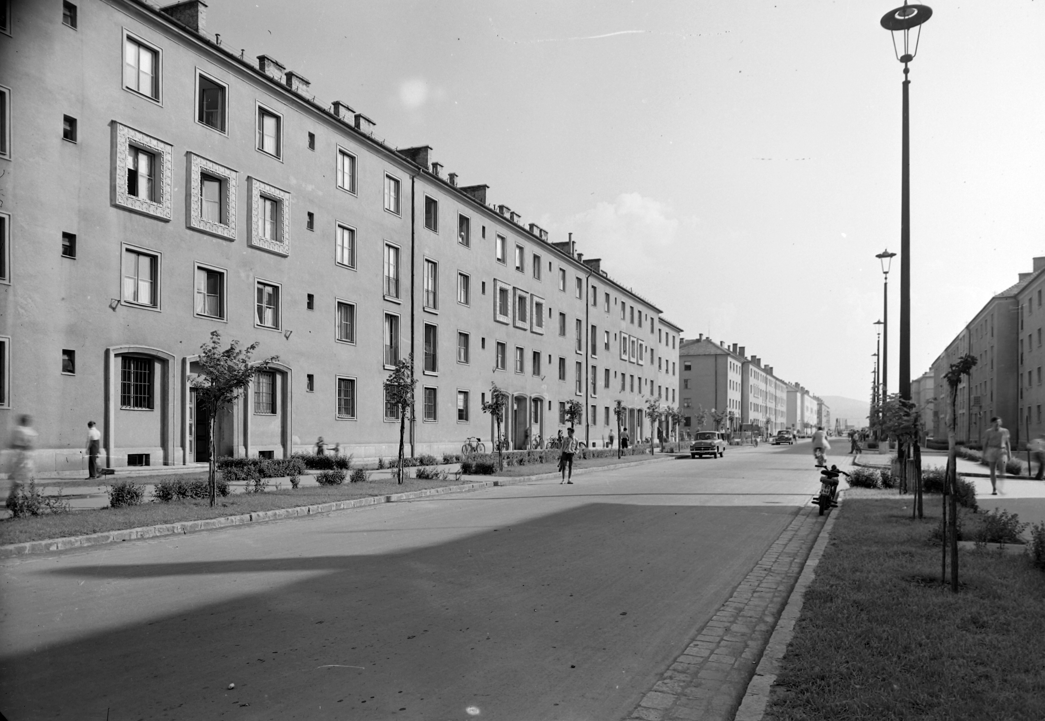 Egressy Béni (Lenin) út páros oldala a Pollack Mihály utca torkolatától nézve. Location: Hungary Tags: street view, lamp post, motorcycle, automobile Title: Egressy Béni (Lenin) út páros oldala a Pollack Mihály utca torkolatától nézve.